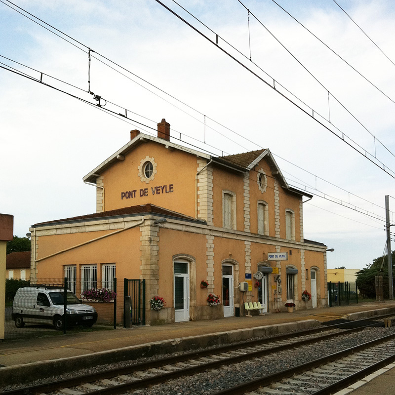 Gare SNCF de Pont de Veyle en 2011.